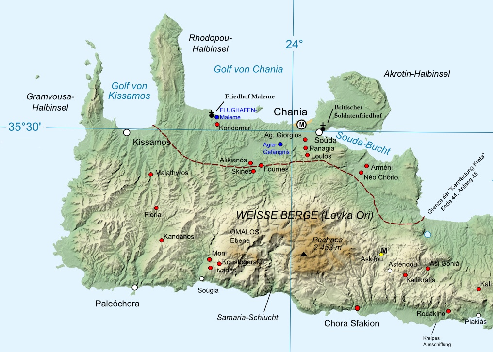 Die "Kernfestung Kreta" 1944 / 45